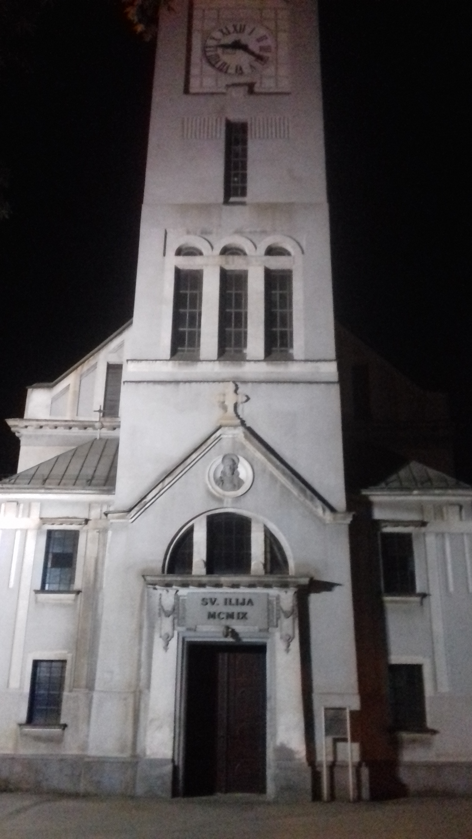 Црква у Зеници